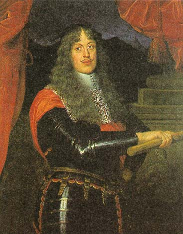 Sigismund Franz von Tirol